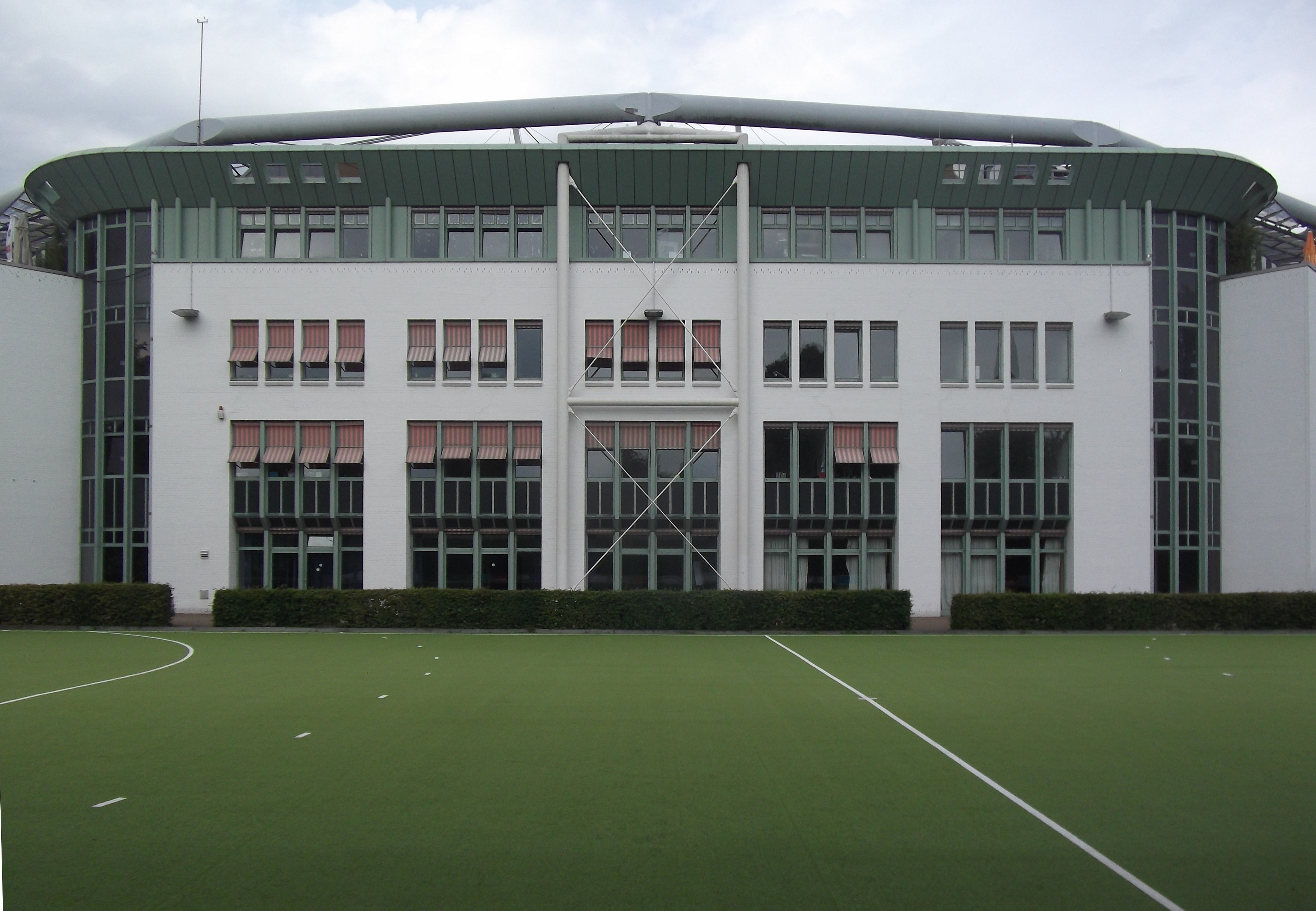 Hamburg, August 2015